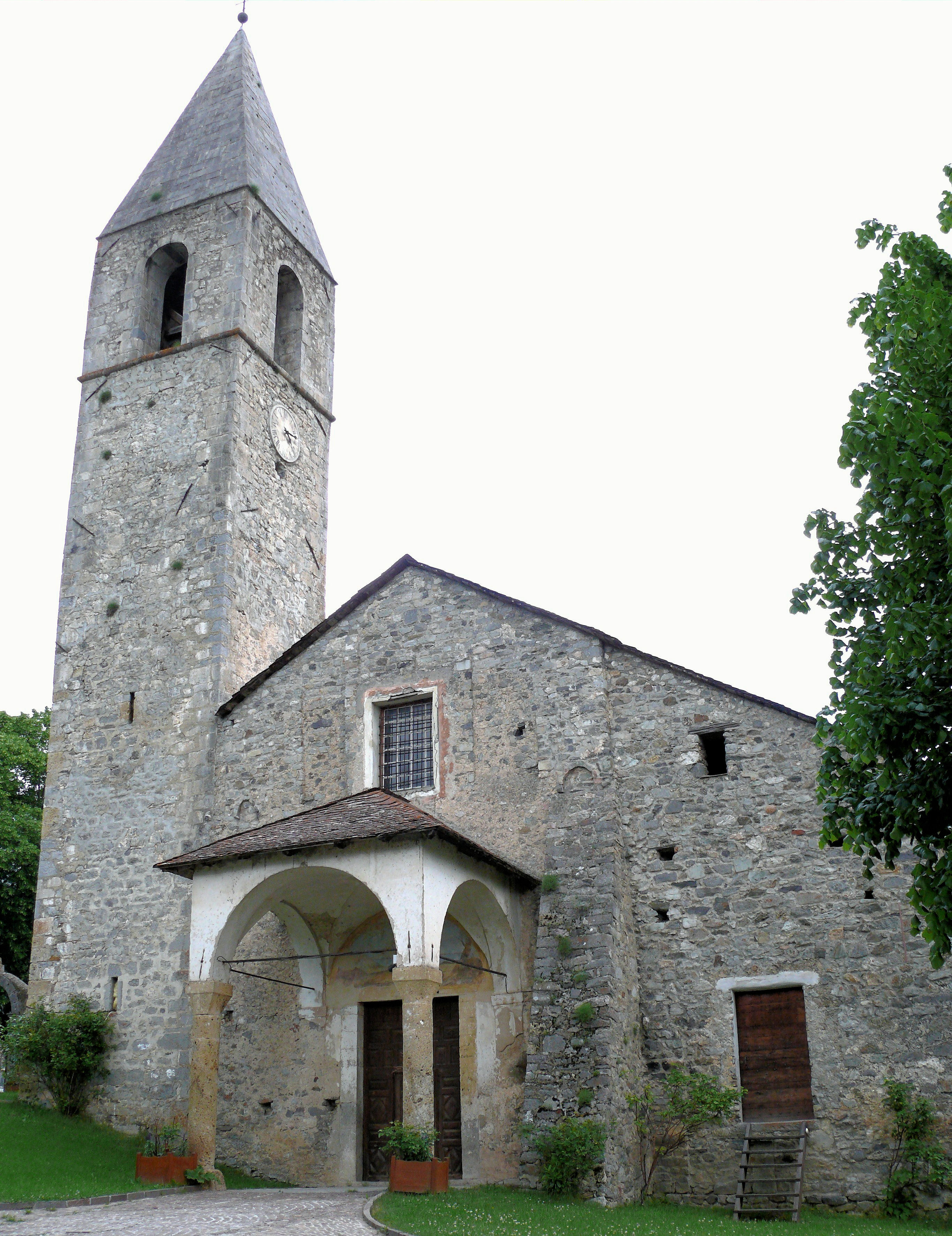 Valdeblore - Saint-Dalmas - Eglise de l'Invention-de la -Sainte-Croix